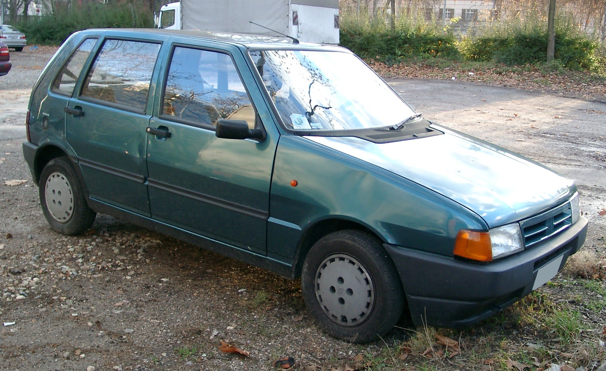 Fiat Uno